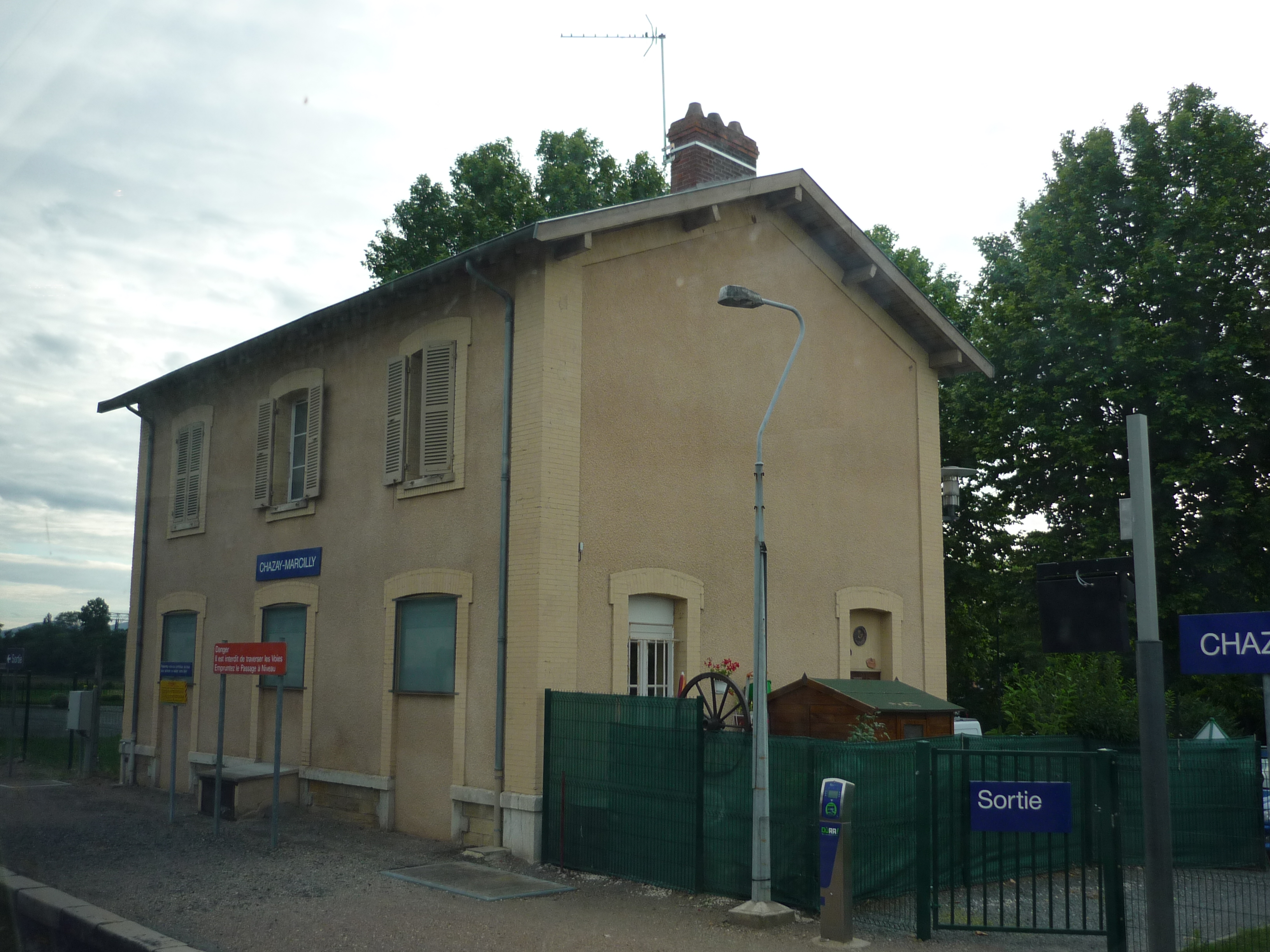 Vue de la gare de Chazay-Marcilly (Rhône, France)